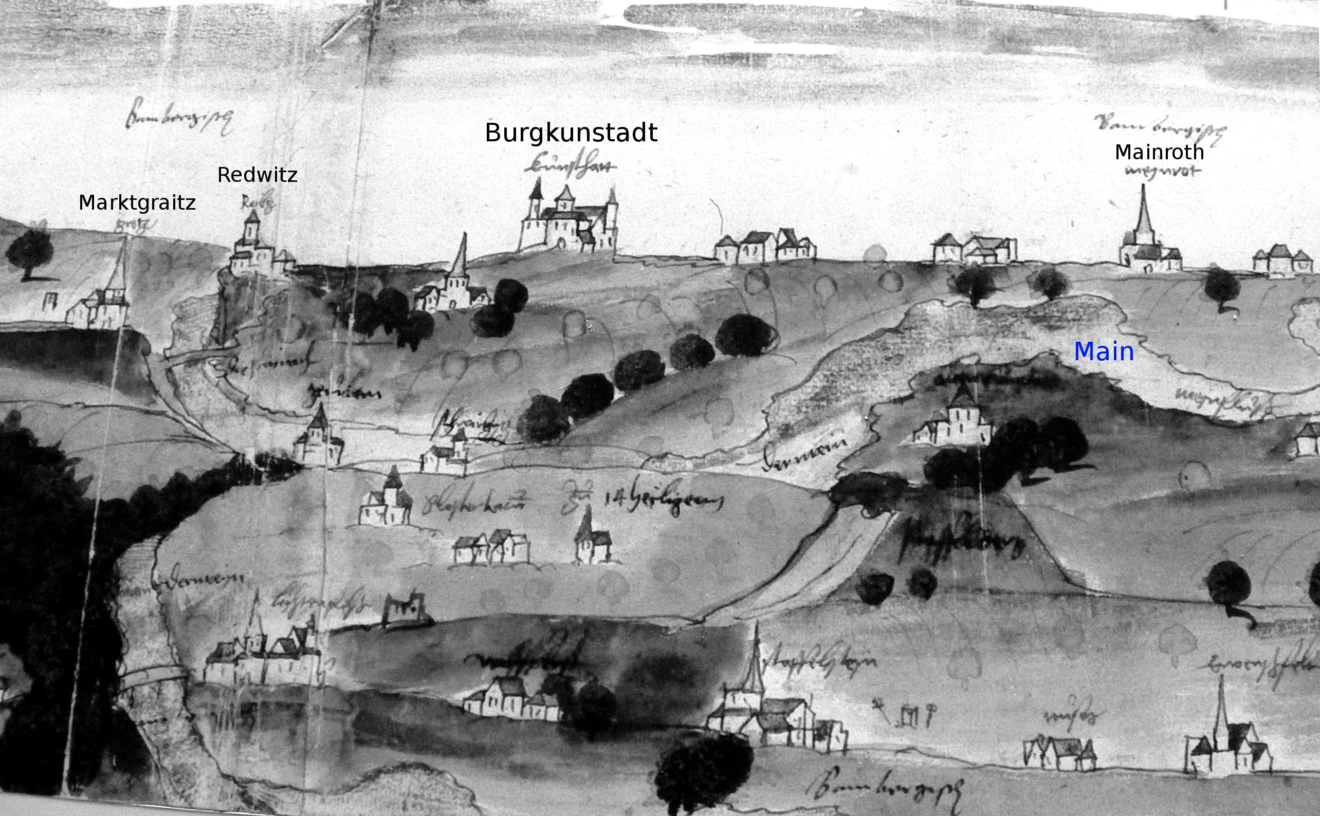 Die Geleitkarte muss man sich zweigeteilt vorstellen. Oben die Strecke Coburg-Kulmbach, unten die Strecke Coburg-Bamberg. Sie zeigt jeweils welche Ortschaften sich auf diesen Strecken befinden. Hochdeutsche Namen von mit mit GIMP eingefügt.